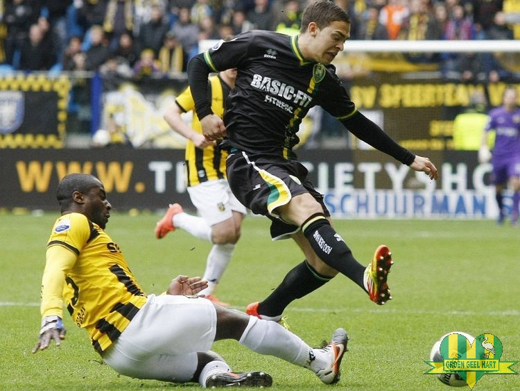 Stanley Aborah